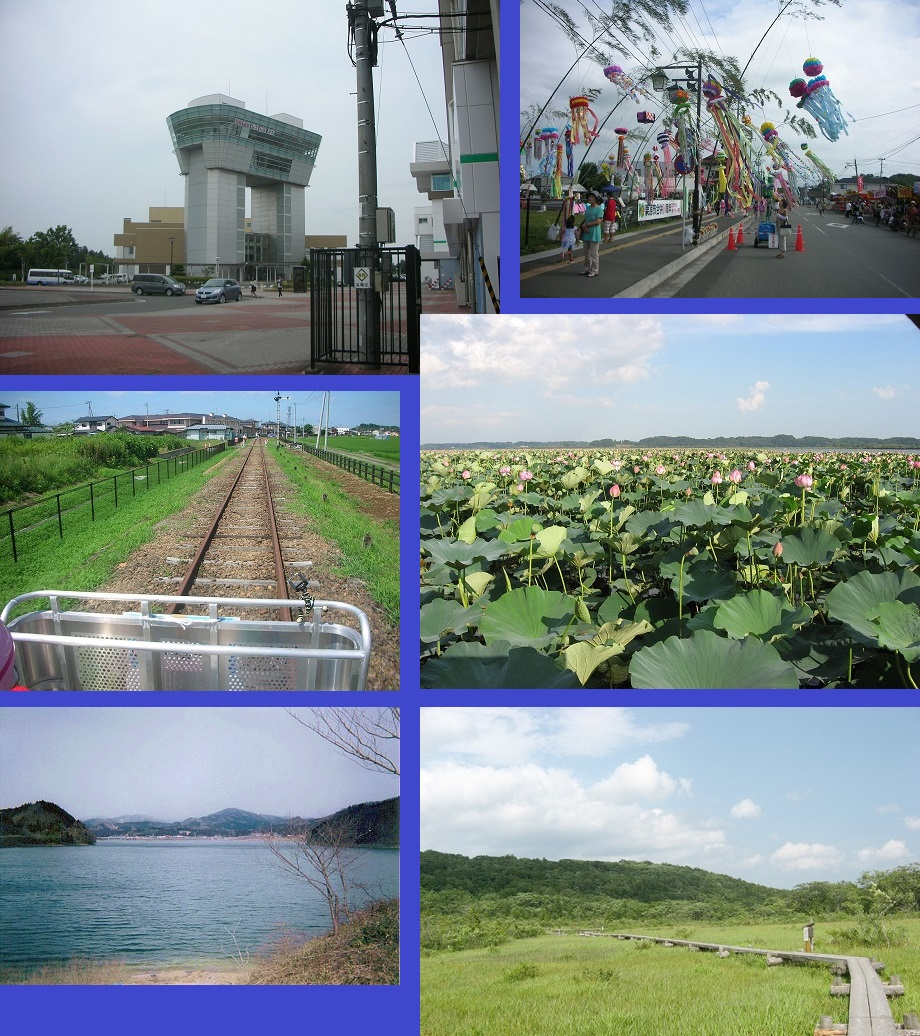 栗原市モンタージュ